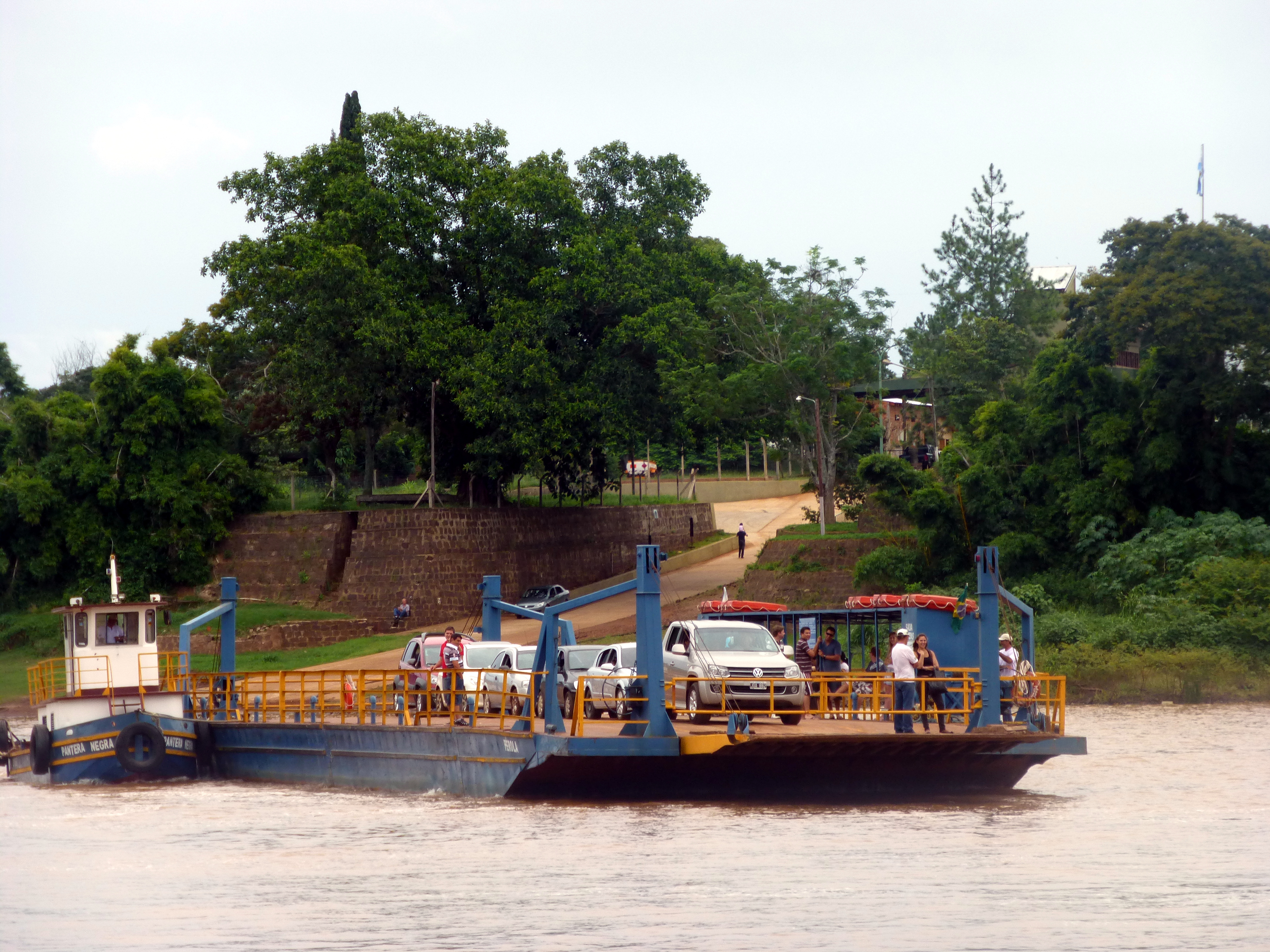 Balsa realizando la travesía sobre el río Uruguay comunicando las ciudades de Alba Posse (Argentina) y de Porto Mauá (Brasil).